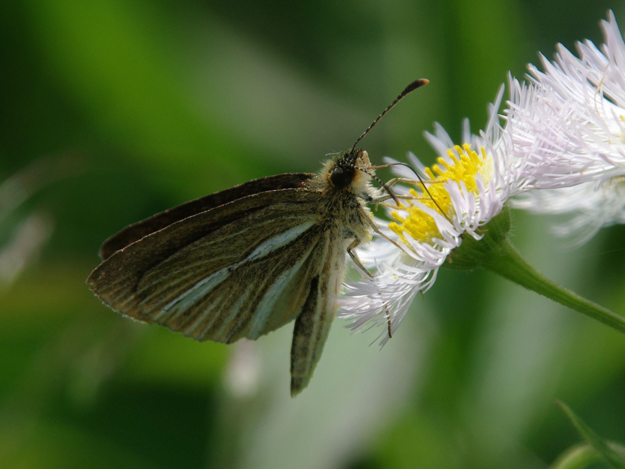 ギンイチモンジセセリ(Leptalina unicolor)